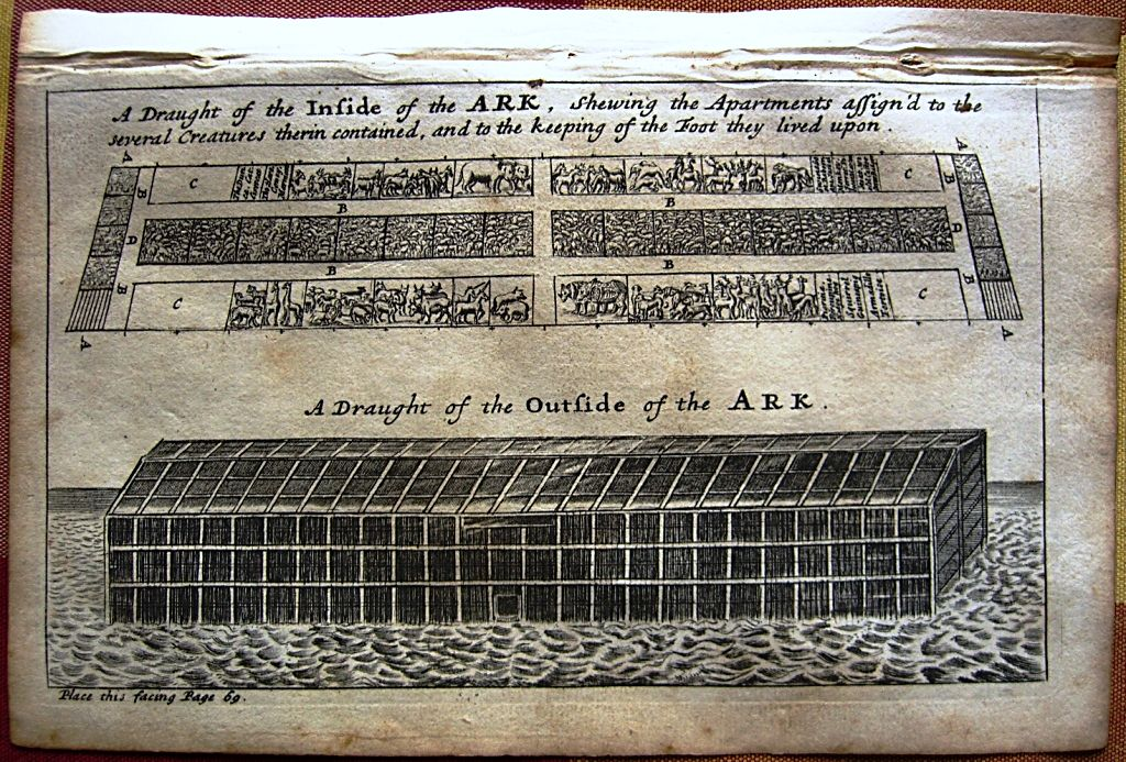 Grabado de principios del S XVIII reflejando el Arca de Noé y la distrbución de los animales que en ella viajaron